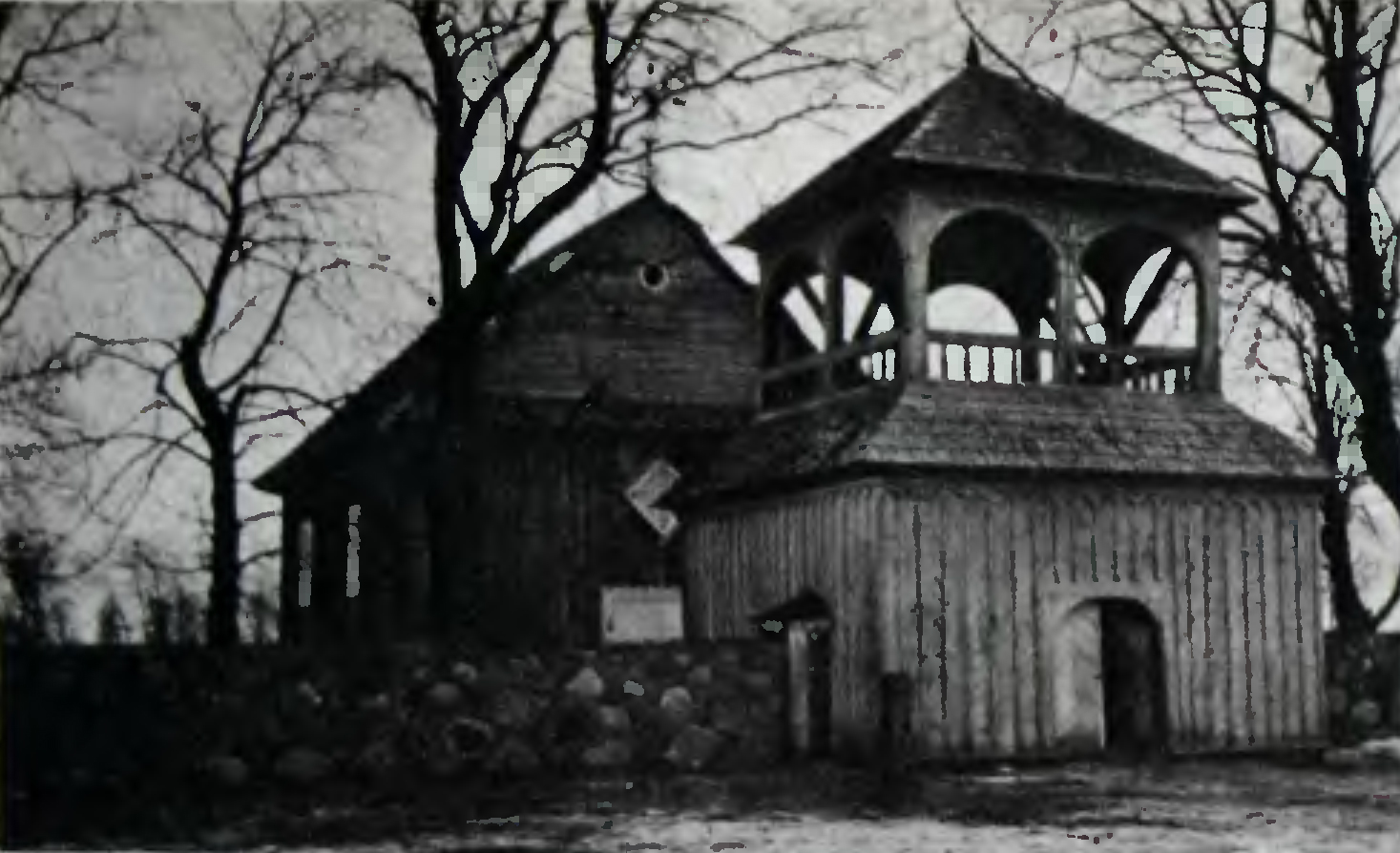 Беларуская (тарашкевіца): Багданаў (Bahdanaŭ). Касьцёл Сьвятога Міхала Арханёла